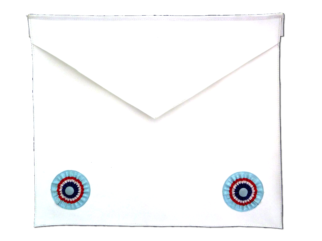 Tablier Français de Compagnon, au Rite symbolique Anglais Emulation